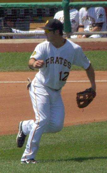 Chase d'Arnaud